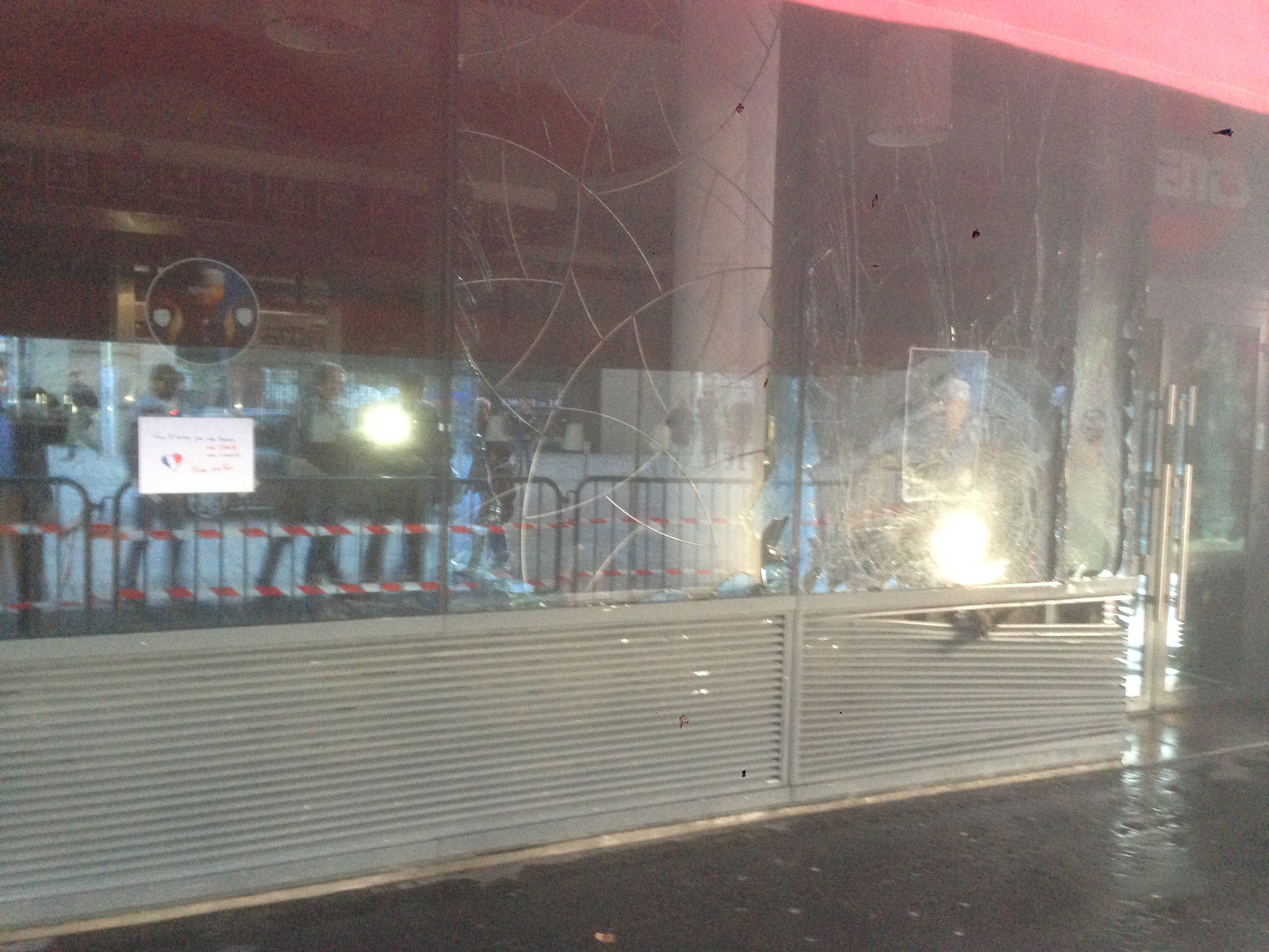 Le restaurant Events, face au Stade de France rue Jules-Rimet, au surlendemain des attentats du 13 novembre 2015